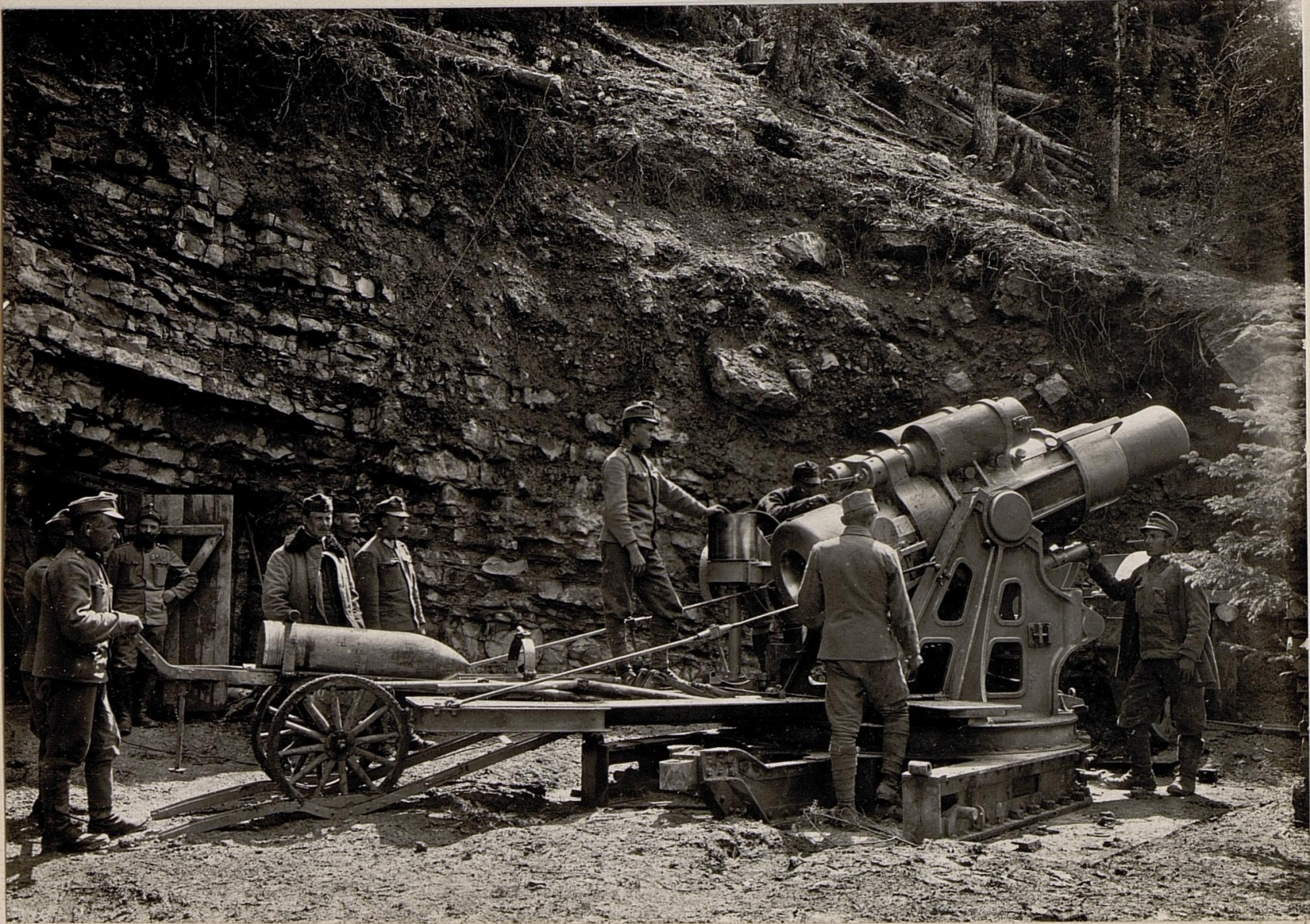 Lavaroneplateau. 30.5 cm Mörser in Feuerstellung.